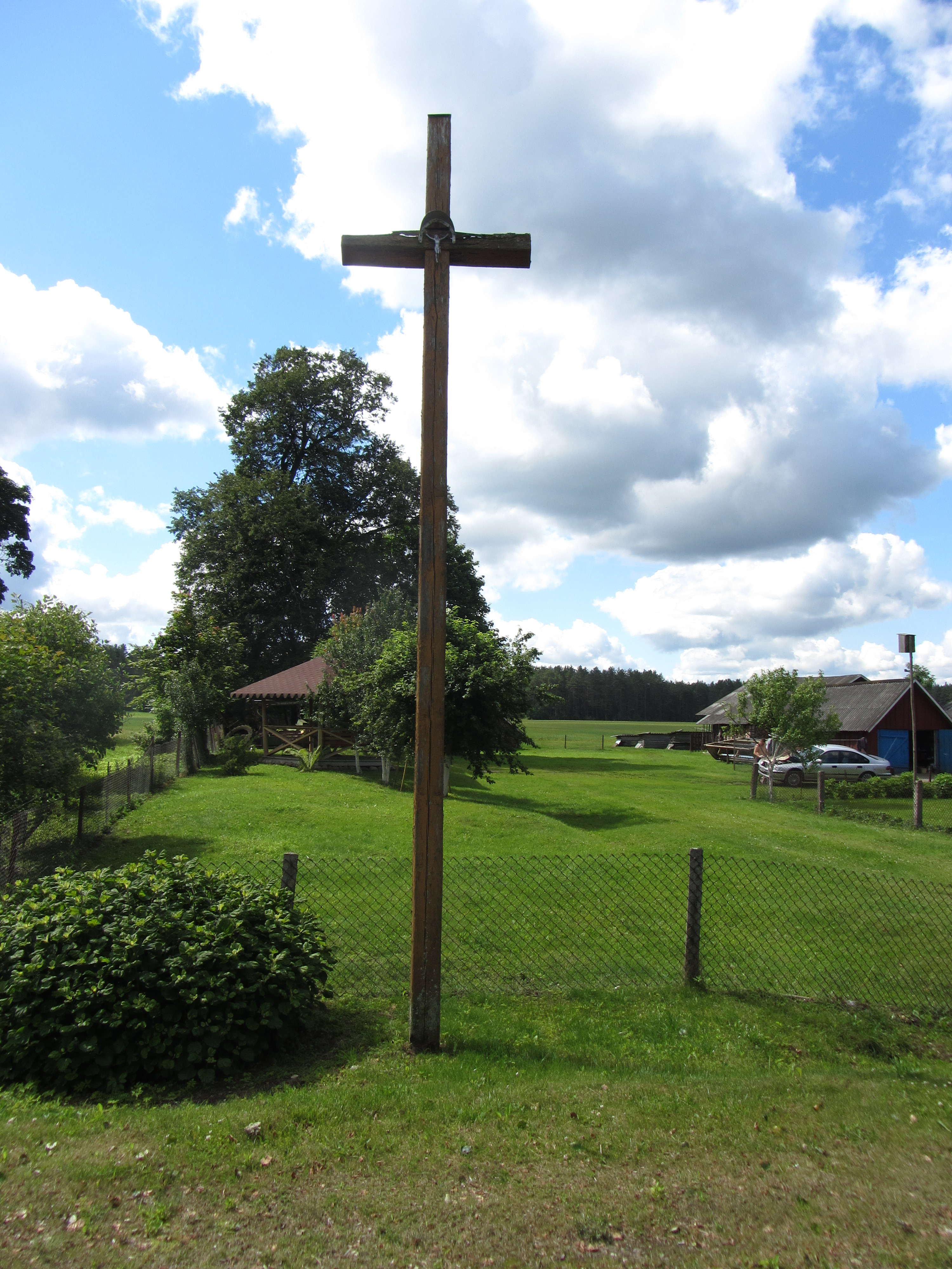 Daumilai 18149, Lithuania